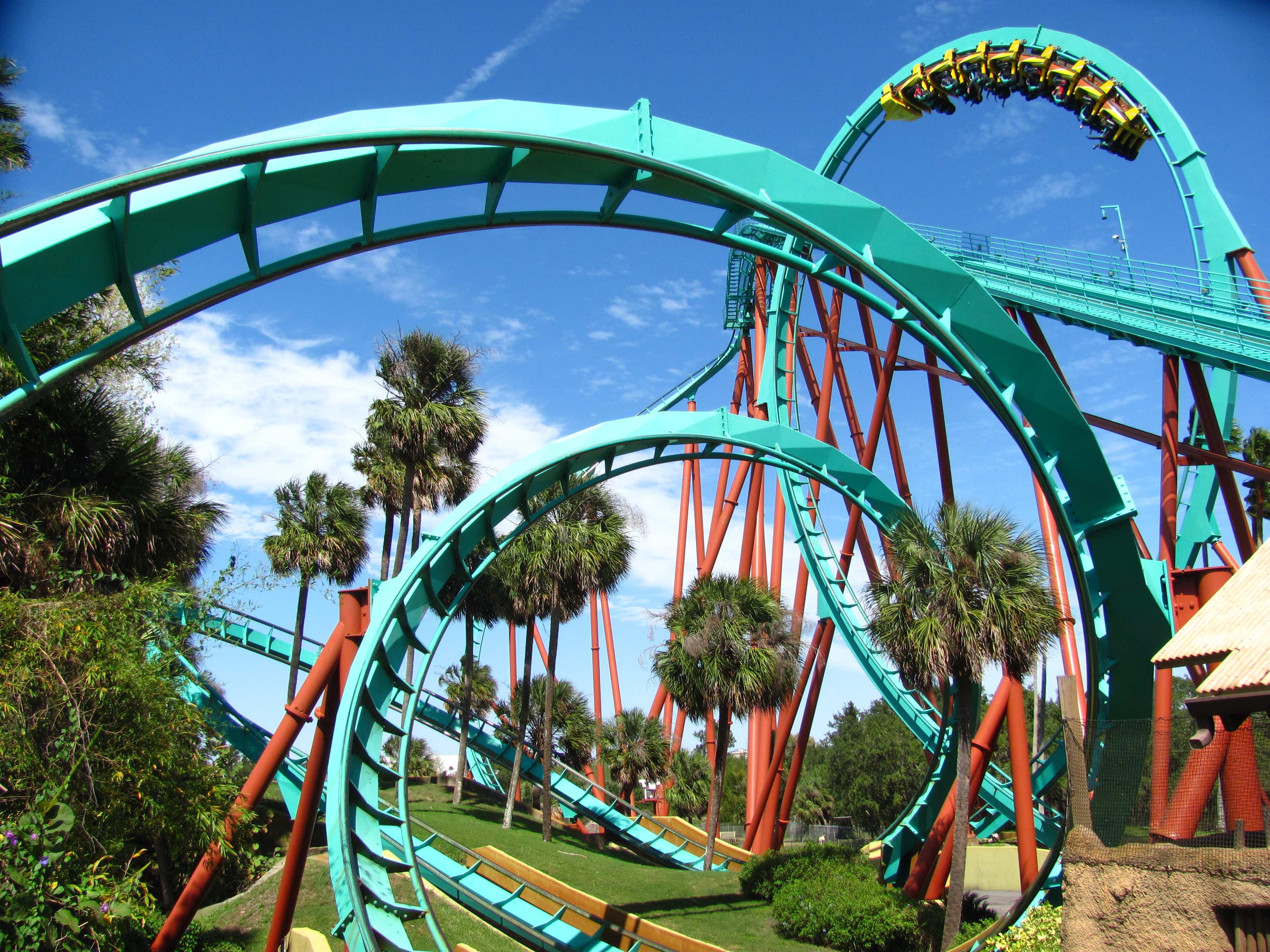 Kumba